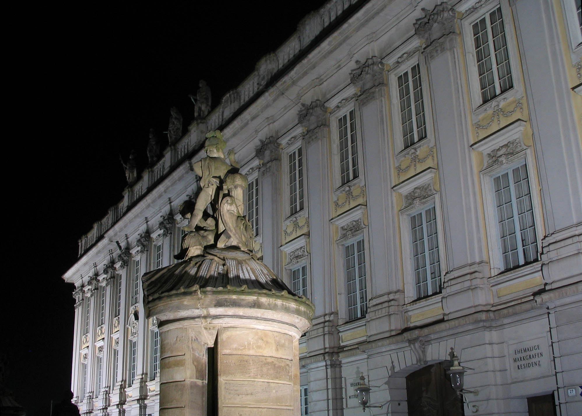 Residenz Ansbach. Schilderhäuschen mit Puttengruppe von Domenico Ferretti am Haupteingang vor dem Südostflügel bei Nacht